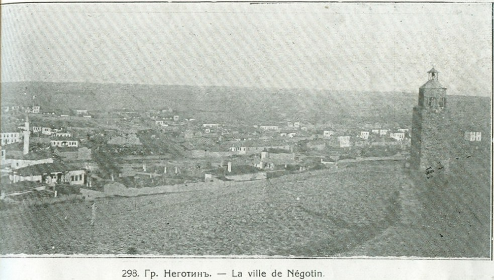 Negotino